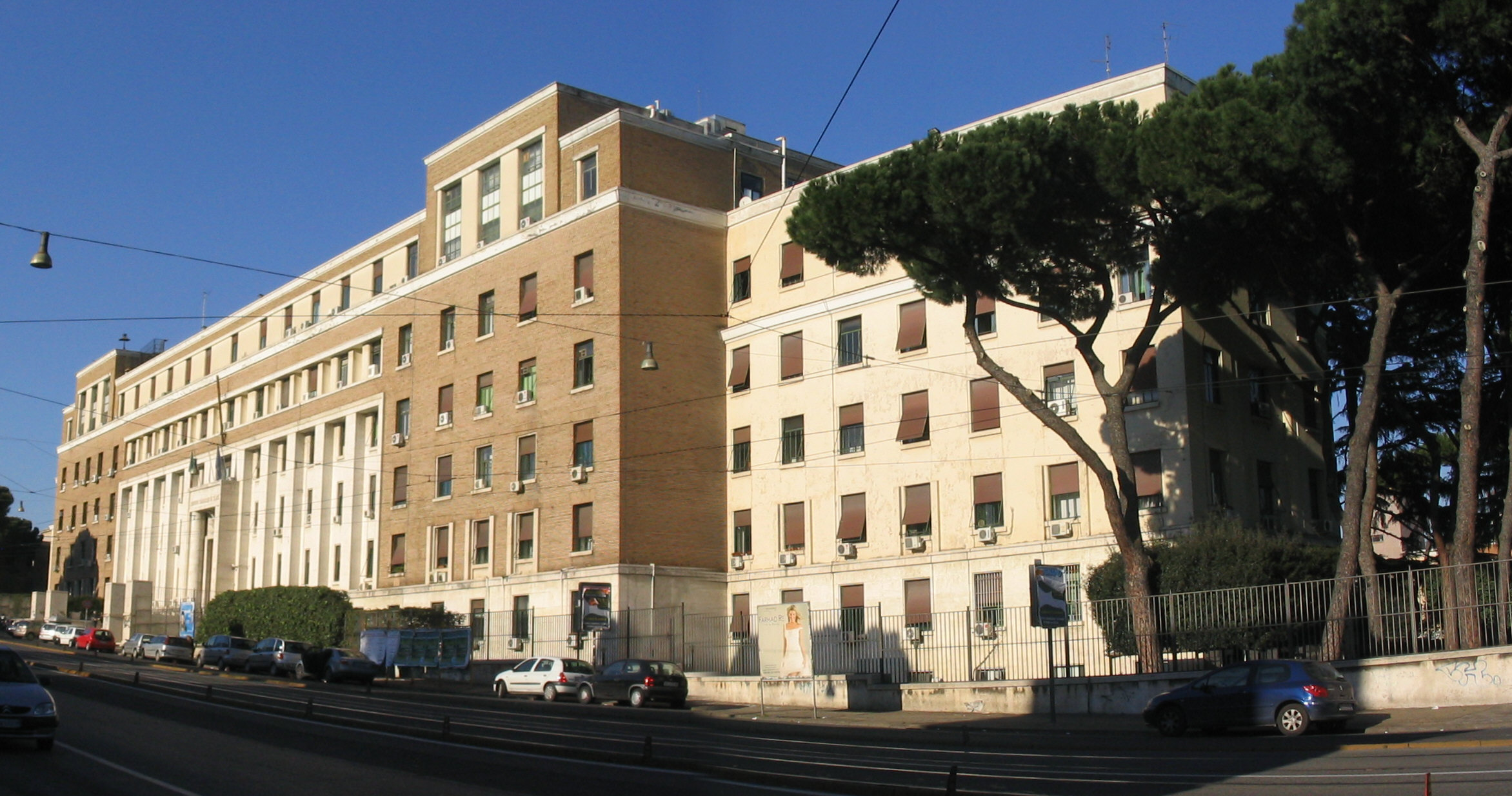 Roma, Istituto Superiore di Sanità: ingresso principale di Viale Regina Elena